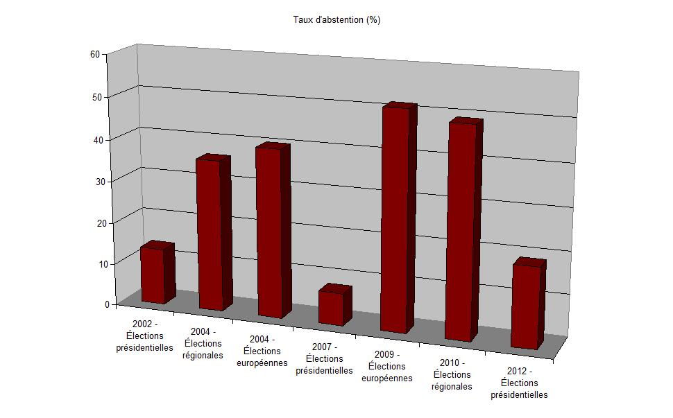 Evolution du taux d'abstention à Coupru (Aisne).